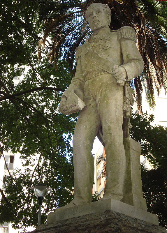 Monumento ao Conde de Porto Alegre, na praça de mesmo nome em Porto Alegre, Brasil. Esculpida por Adriano Pittanti e Carlos Fassati. século XIX.